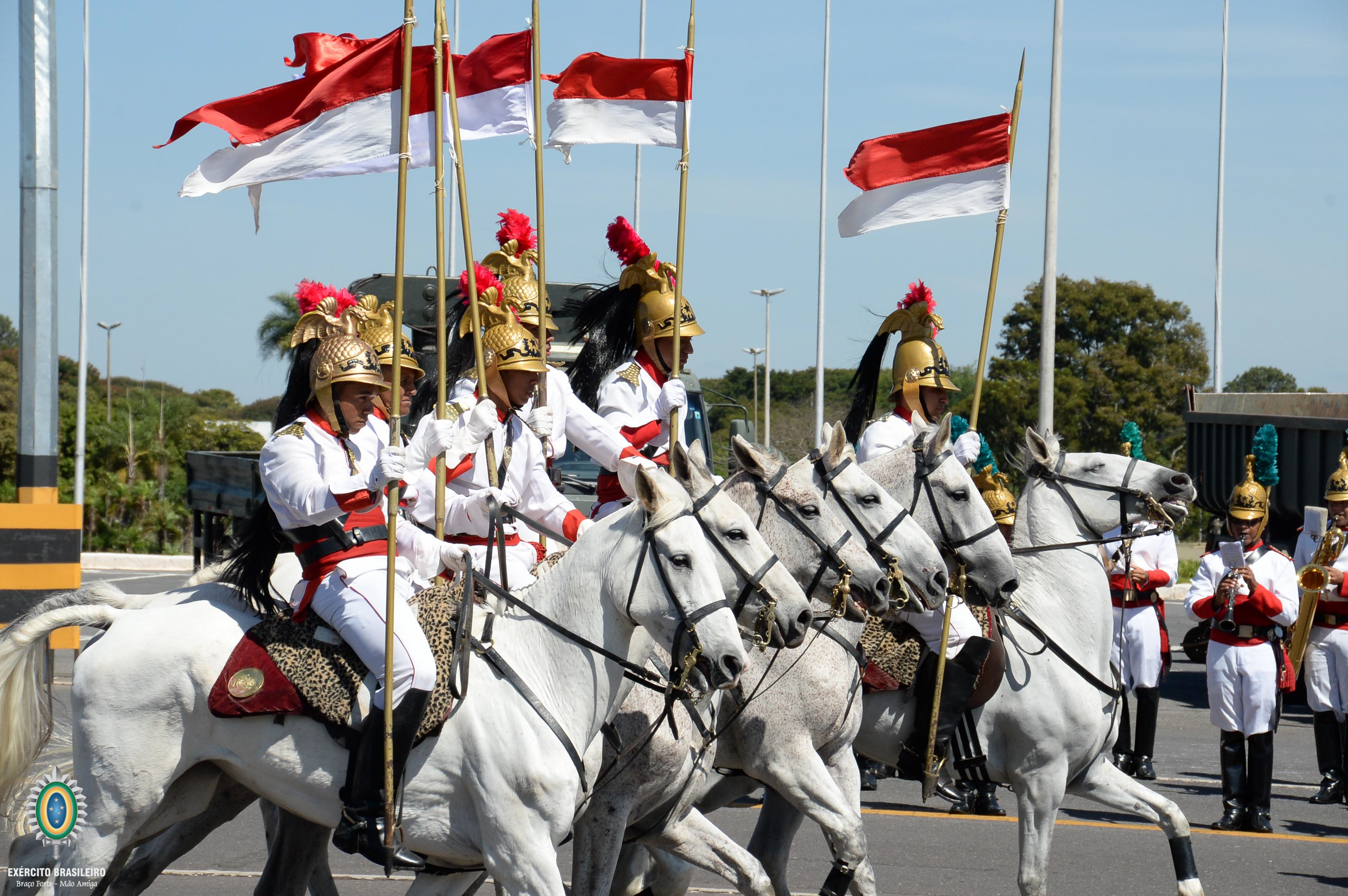 Formatura do Dia da Engenharia 2016